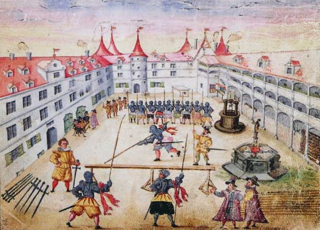 Fußturnier, Tübingen, 1602. Es handelt sich um eine spätere Turnierform, die sich erst im 16. Jh. durchsetzte. Stammbuch des Andreas Chemnitius. Glauchau u.a., 1597-1626. Museum für Kunst und Gewerbe, Hamburg, Inv. Nr. 1908, 524, nach: Die Renaissance im deutschen Südwesten, Bd. 2, Karlsruhe 1986, S. 915.